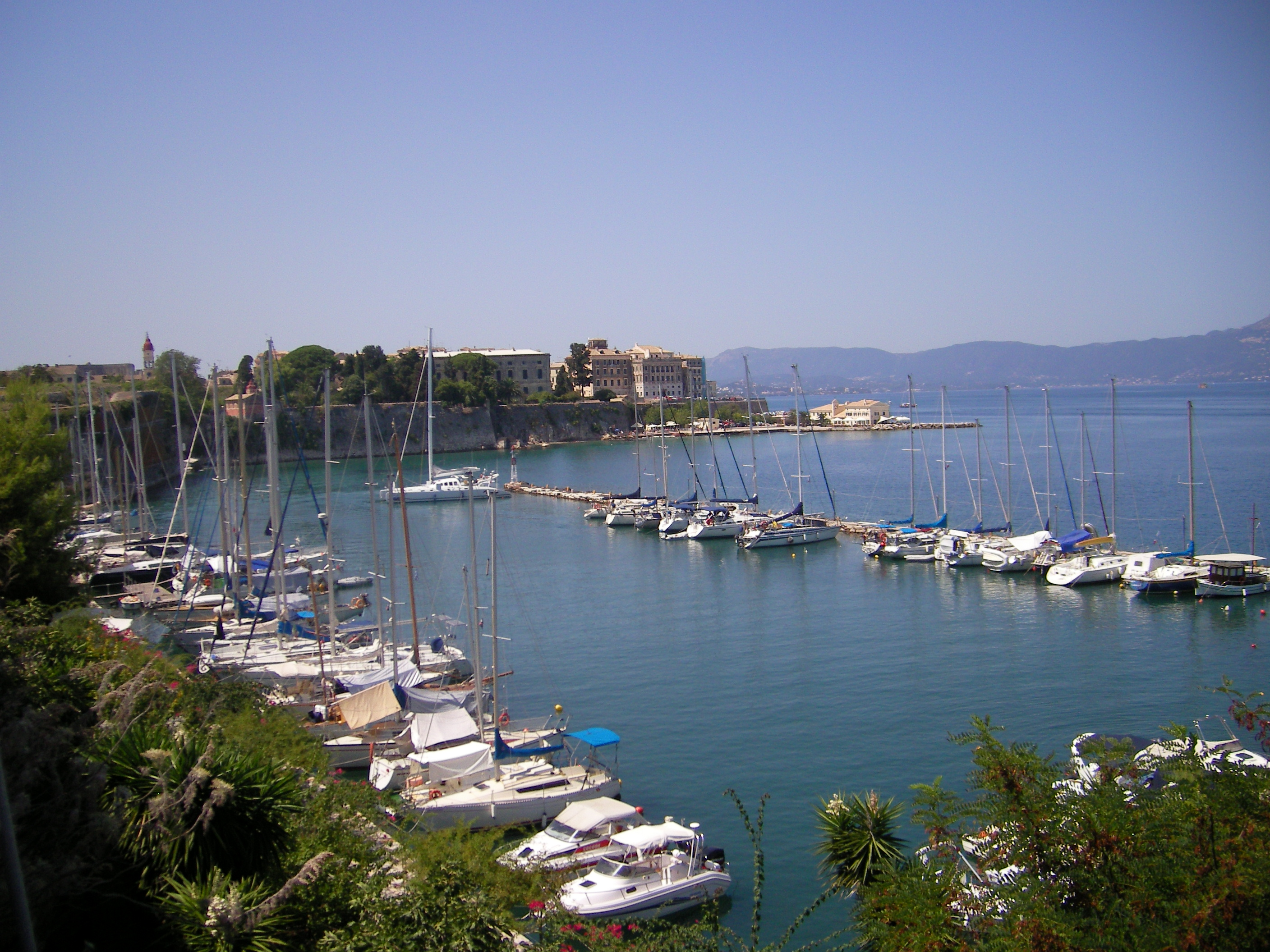 Lystbådehavnen i Korfu by.